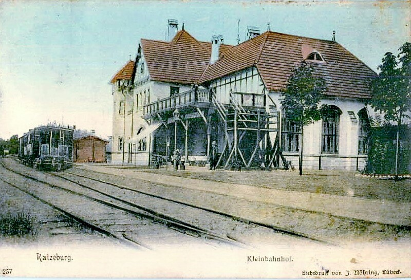 Kleinbahnhof vom Seeufer aus betrachtet